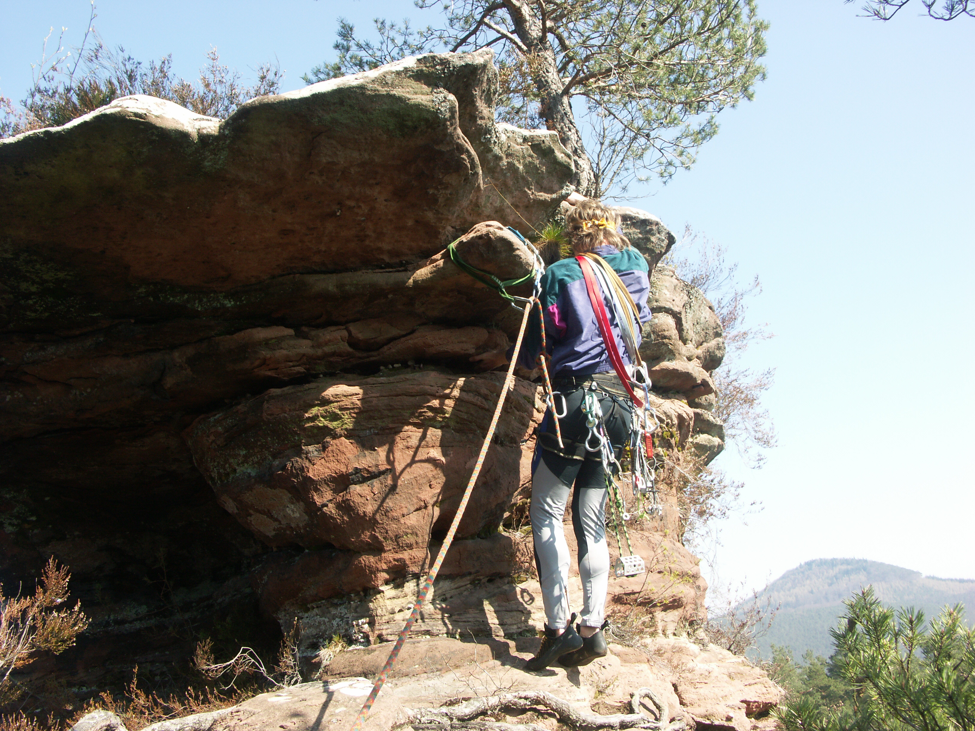 Deutschland, Rheinland-Pfalz, Südpfalz, Retschelfelsen bei Bruchweiler